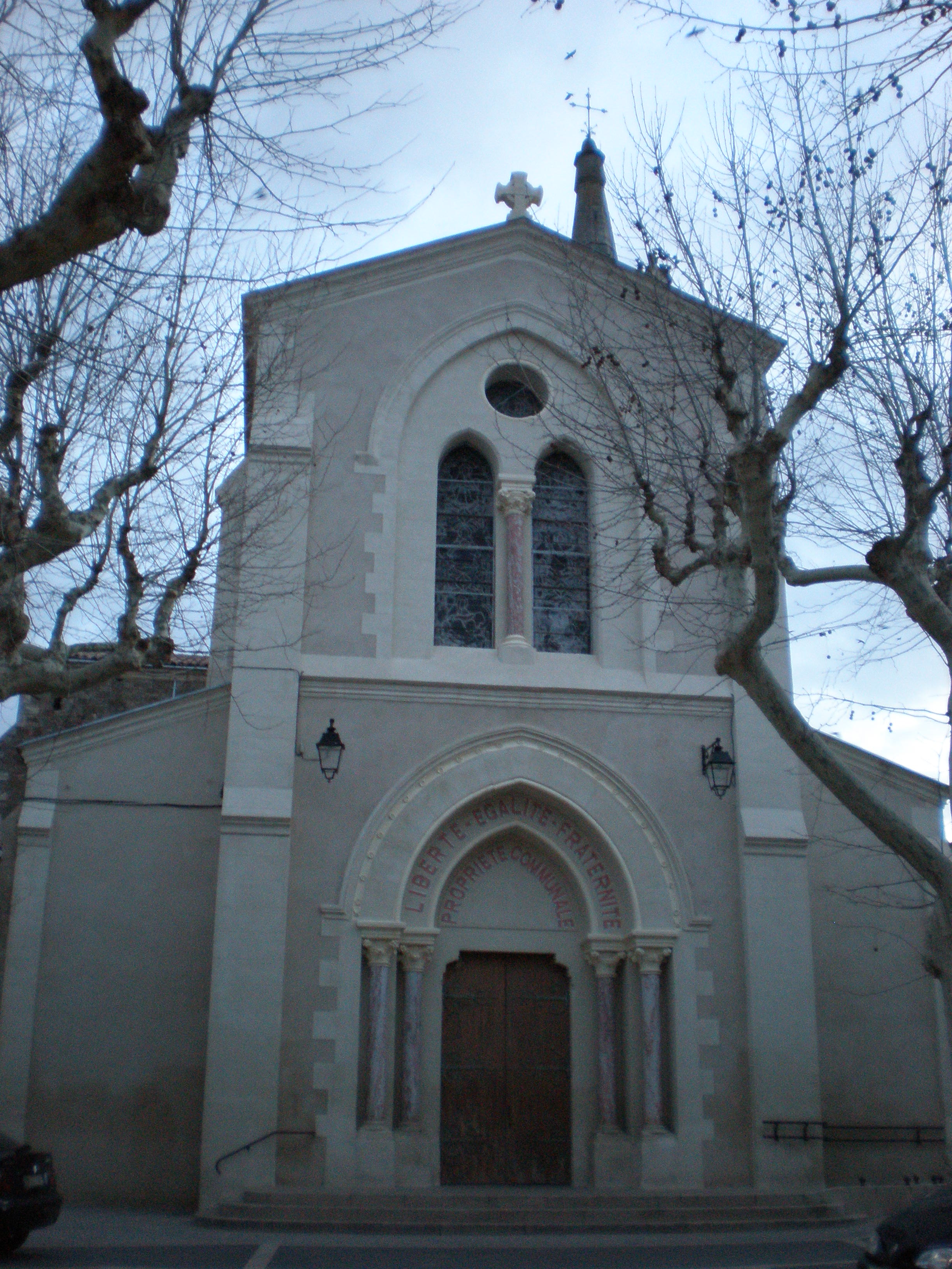 Eglise Notre-Dame de l'Assomption d'Olonzac (Hérault, France)